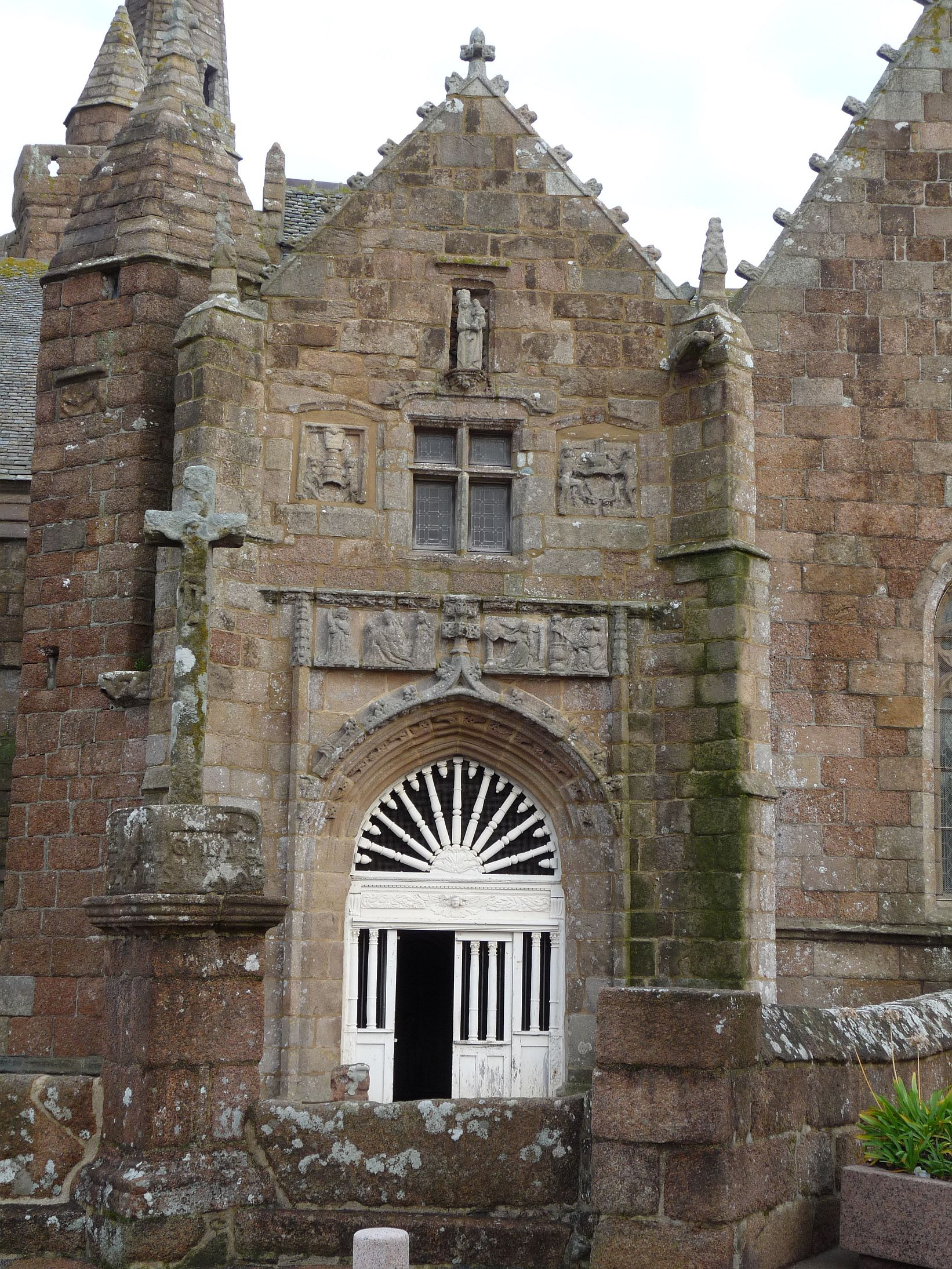 Le Portail Sud de la chapelle Notre-Dame de la Clarté à Perros-Guirec, (Côtes d'Armor)